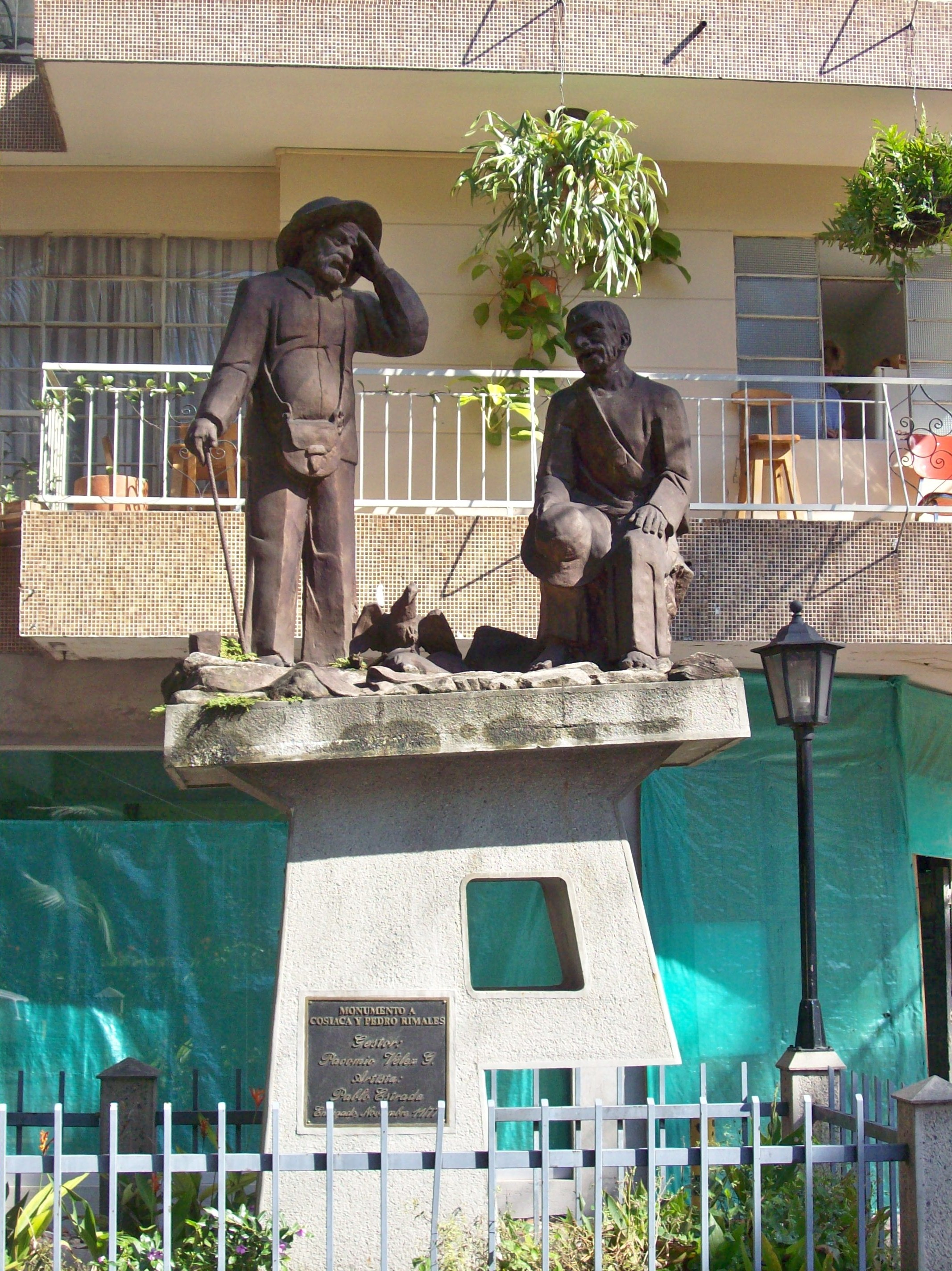 Monumento a Cosiaca y Pedro Rimales Gestor: Pacomio Vélez G. Artista: Pablo Estrada Envigado, Noviembre 11/77